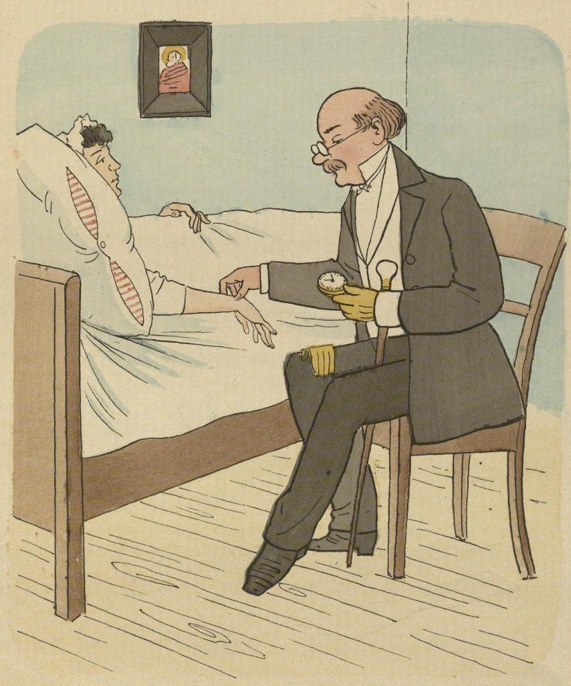 Was soll ich werden? Ein lehrreiches Bilderbuch von Lothar Meggendorfer. Text von Franz Bonn. München: Braun & Schneider.